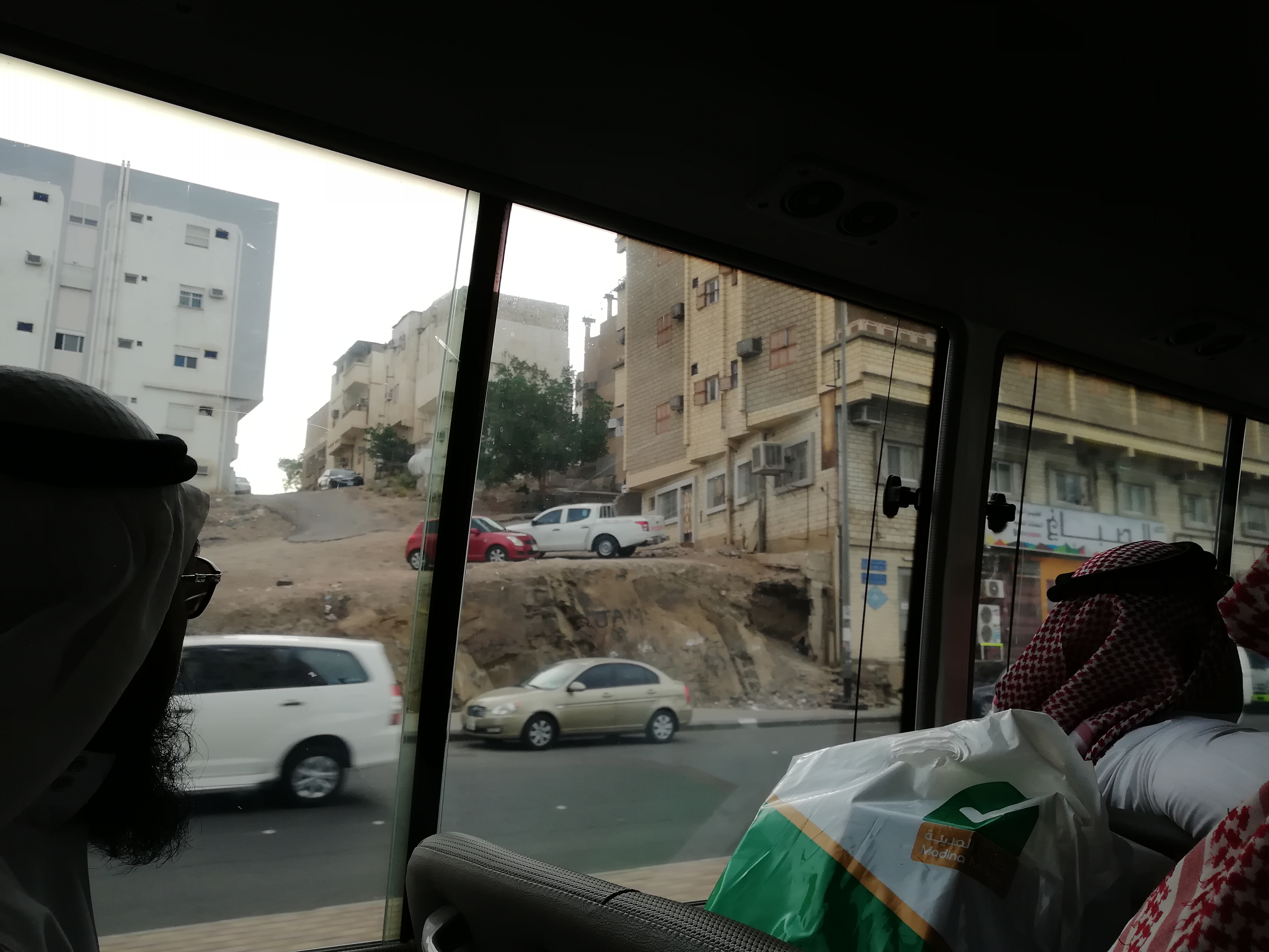 al-Madinah al-Munawarah may be Raya hill Mosque